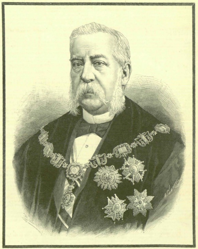 Eduardo Alonso Colmenares.